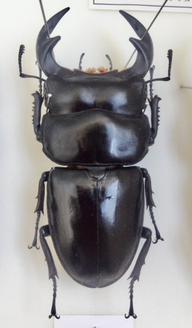 アンタエウス タイ産 83.3㎜